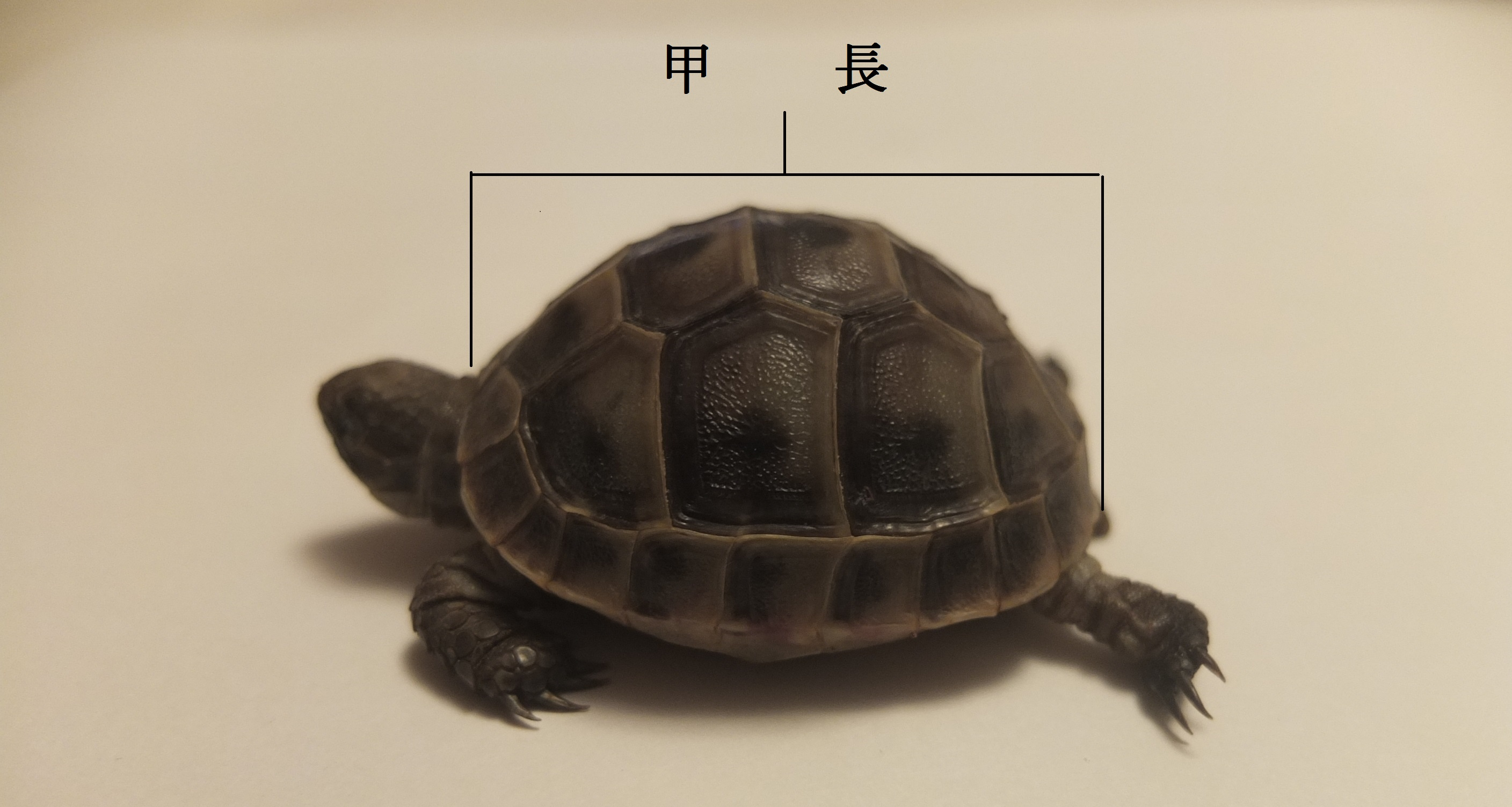 甲長に関する説明。 飼育しているイベラギリシャリクガメです。